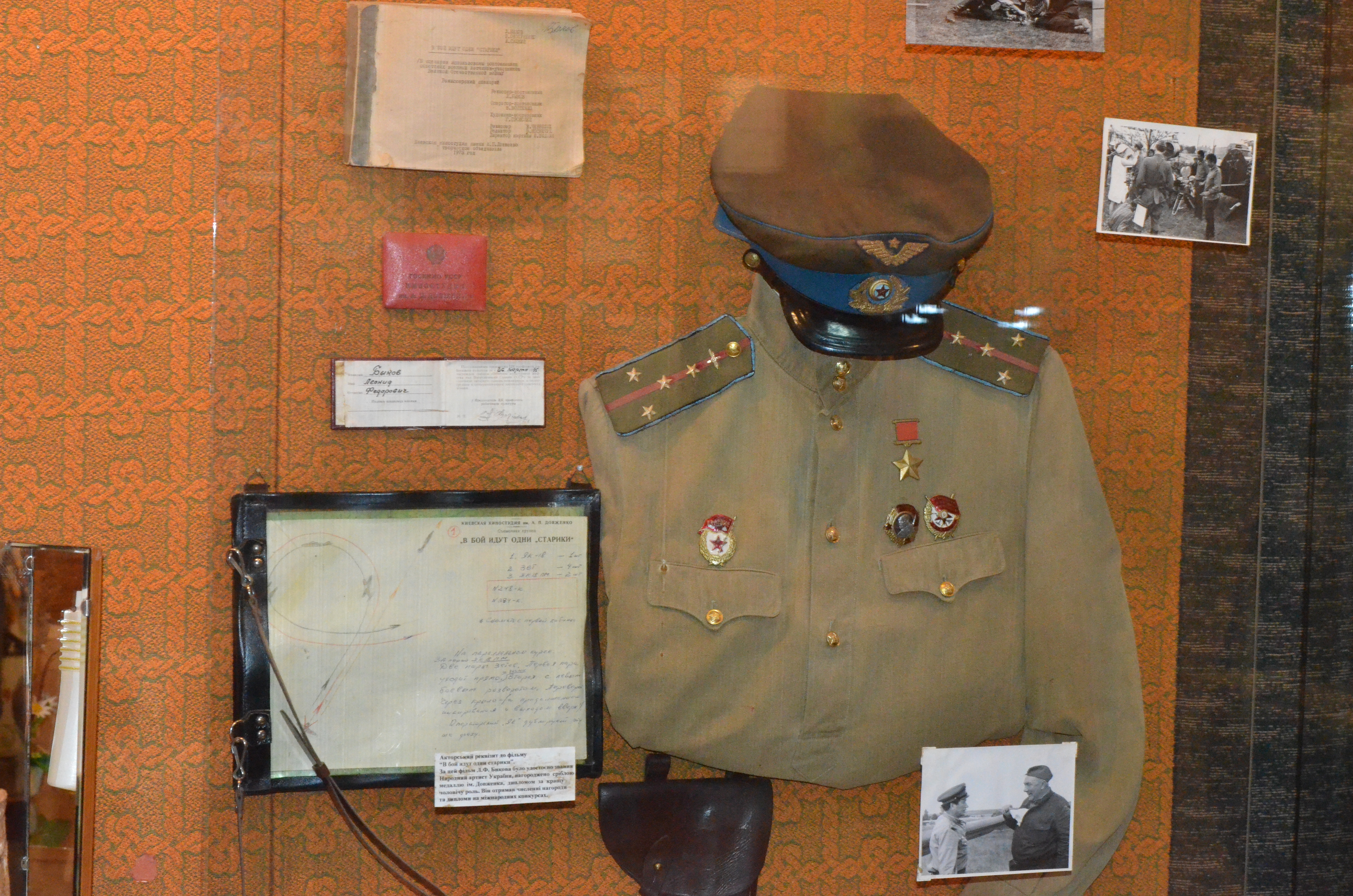 Музей истории города Краматорска